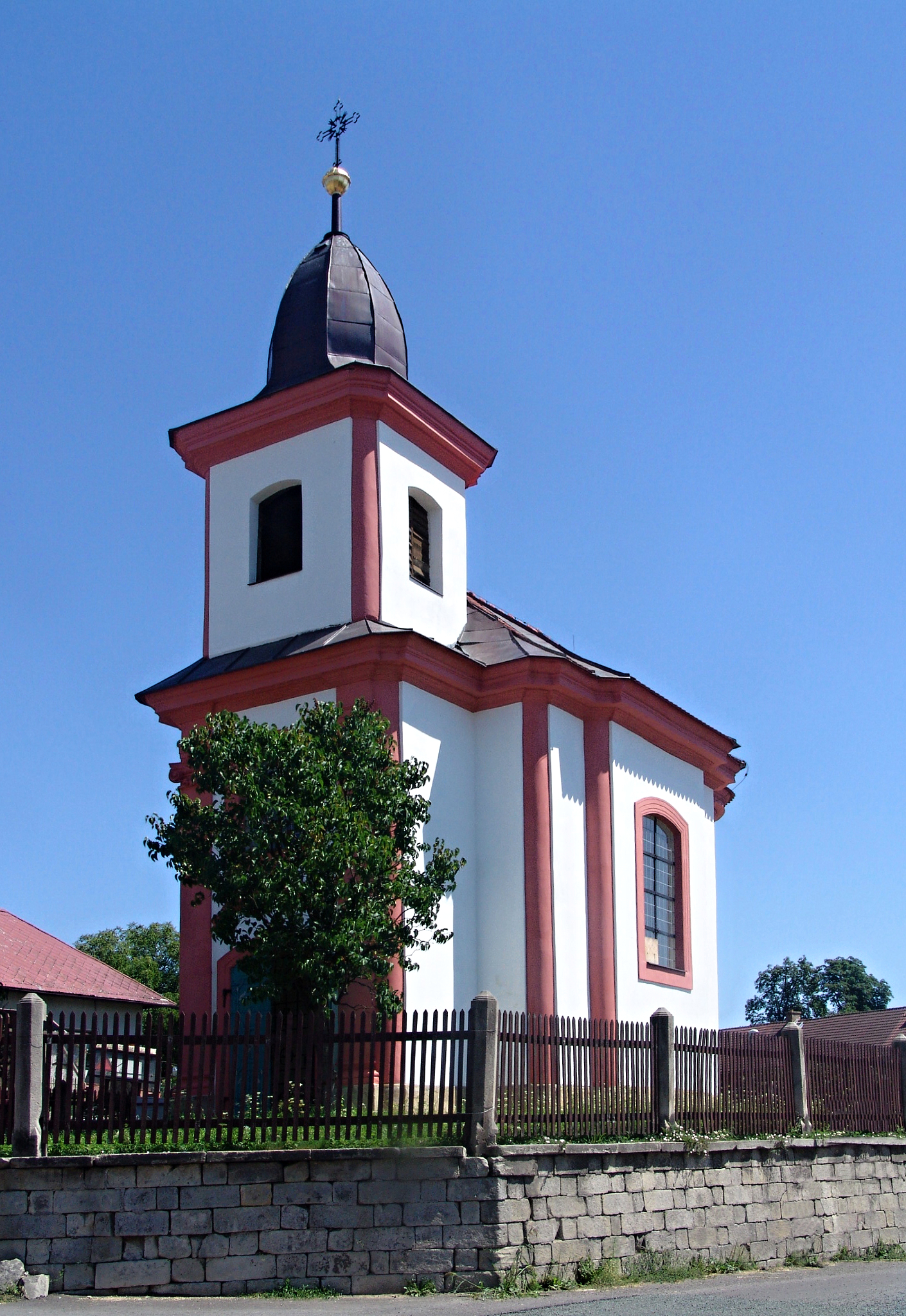 Kaple svatého Jana Nepomuckého, Bukvice (okres Jičín).